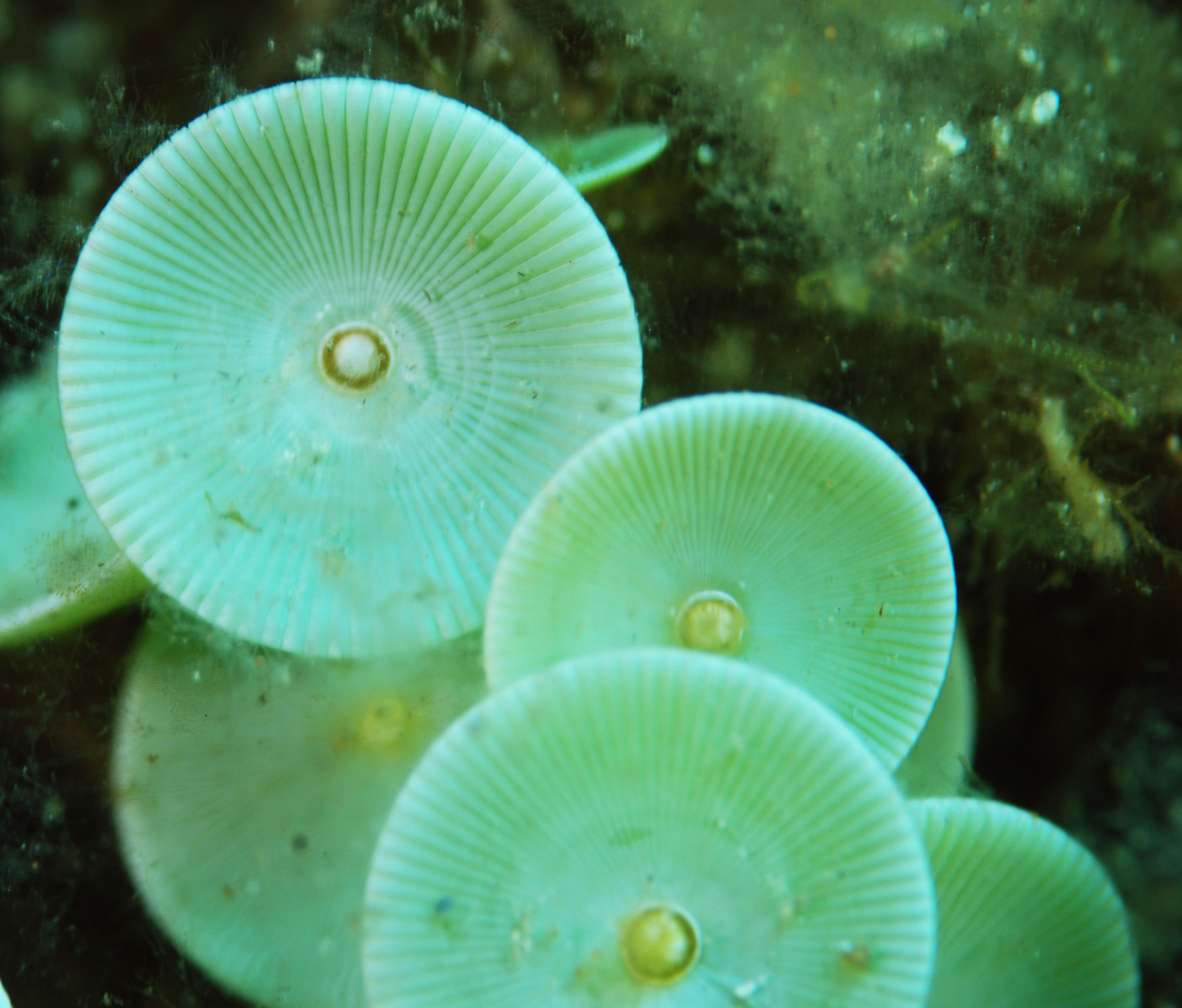 Acetabularia mediterranea